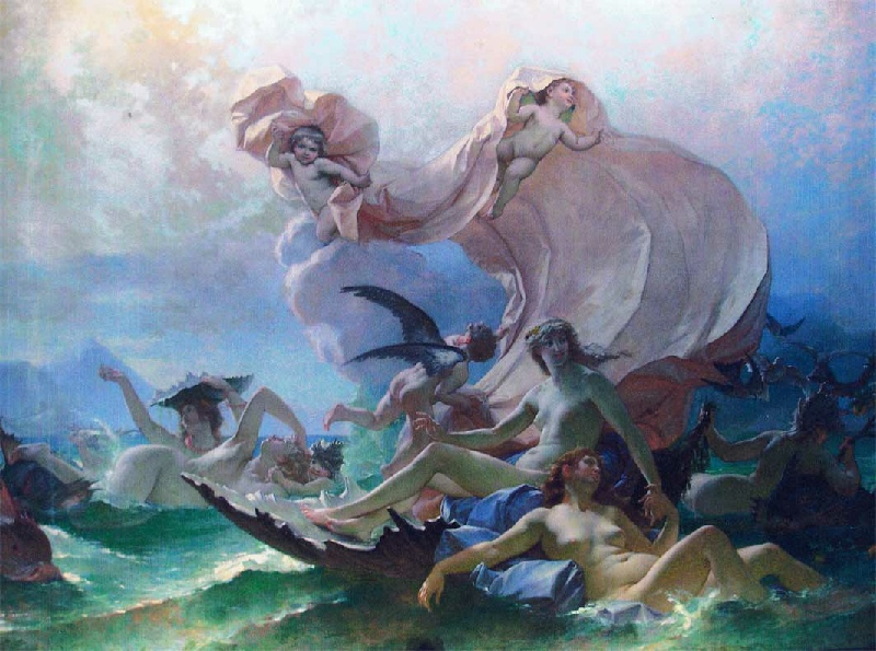 Venus marine. Huile sur toile marouflée au plafond - Cette toile a été réalisée pour orner le plafond de l'hôtel Mazewski. Lors de sa destruction, la toile a été démontée et déplacée au 24 bis boulevard Saint Germain; elle orne aujourd'hui la salle du conseil d'administration de la Fédération nationale André Maginot.